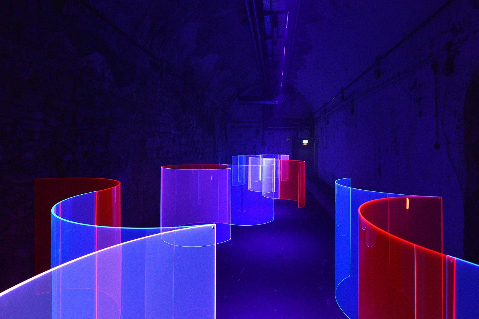 Regine Schumann – Ausstellung „Dark“, Lichtkunstmuseum Unna, 2015